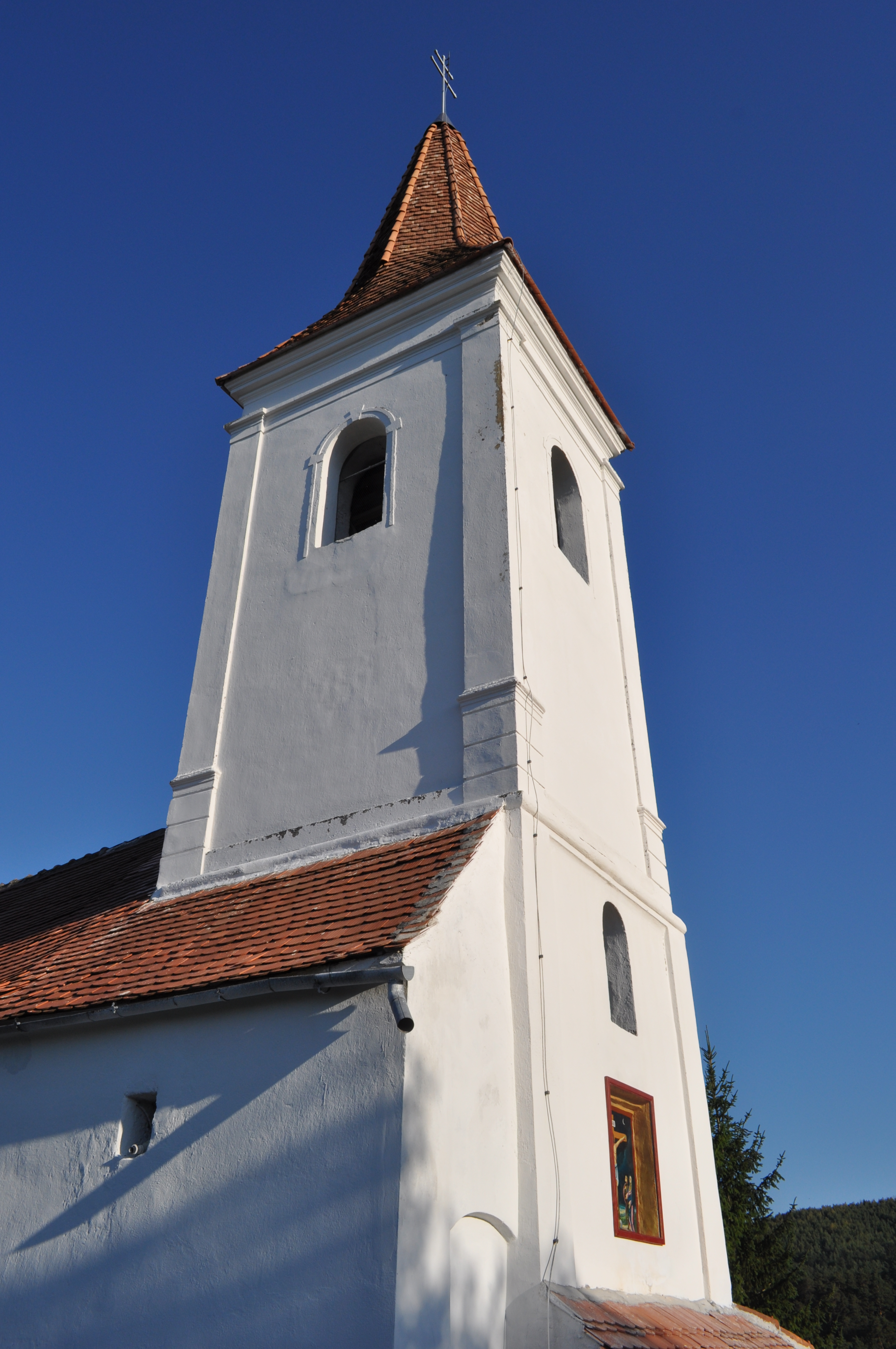 Biserica ortodoxă „Sfânta Treime”